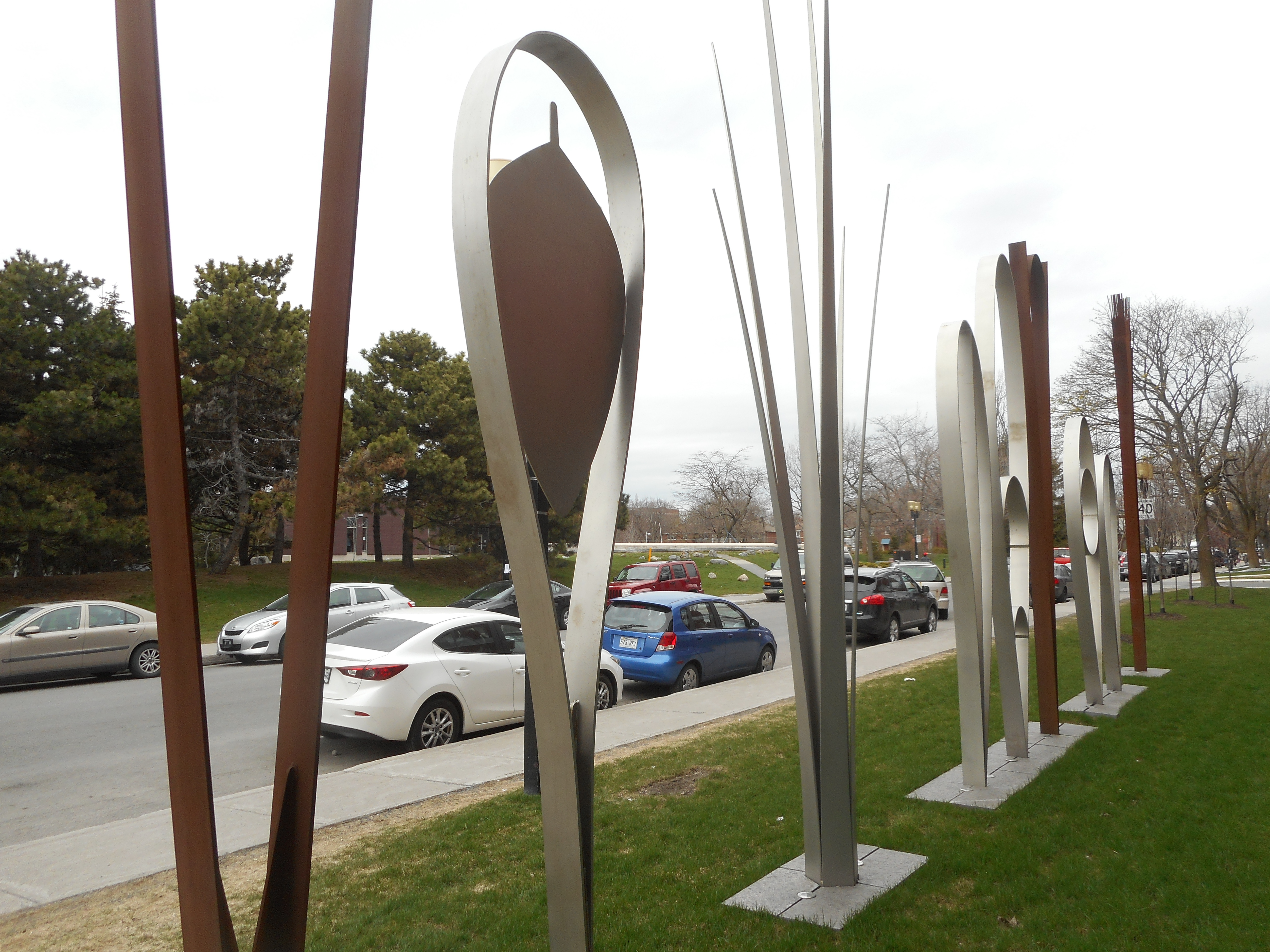 L'apprivoisement, sculpture de Francine Larivée, réalisée en 2013, installée devant le CLSC de Benny Farm, à Montréal « Neuf sculptures, figures allégoriques, évoquent la nature. l'oeuvre interpelle celles et ceux qui passent, celles et ceux qui fréquentent les lieux, celles et ceux qui y séjournent, y travaillent. Et plus largement, elle s'inscrit dans l'univers pensé et construit de Benny Farm et de sa communauté. »